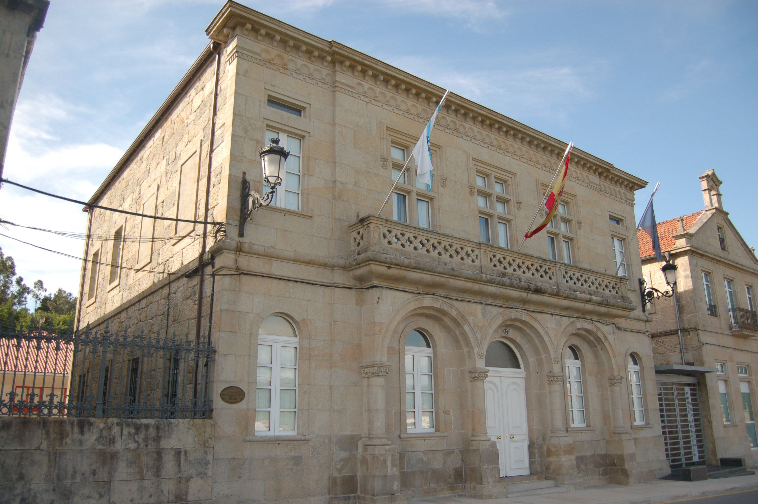 Casa consistorial de Ponte Caldelas